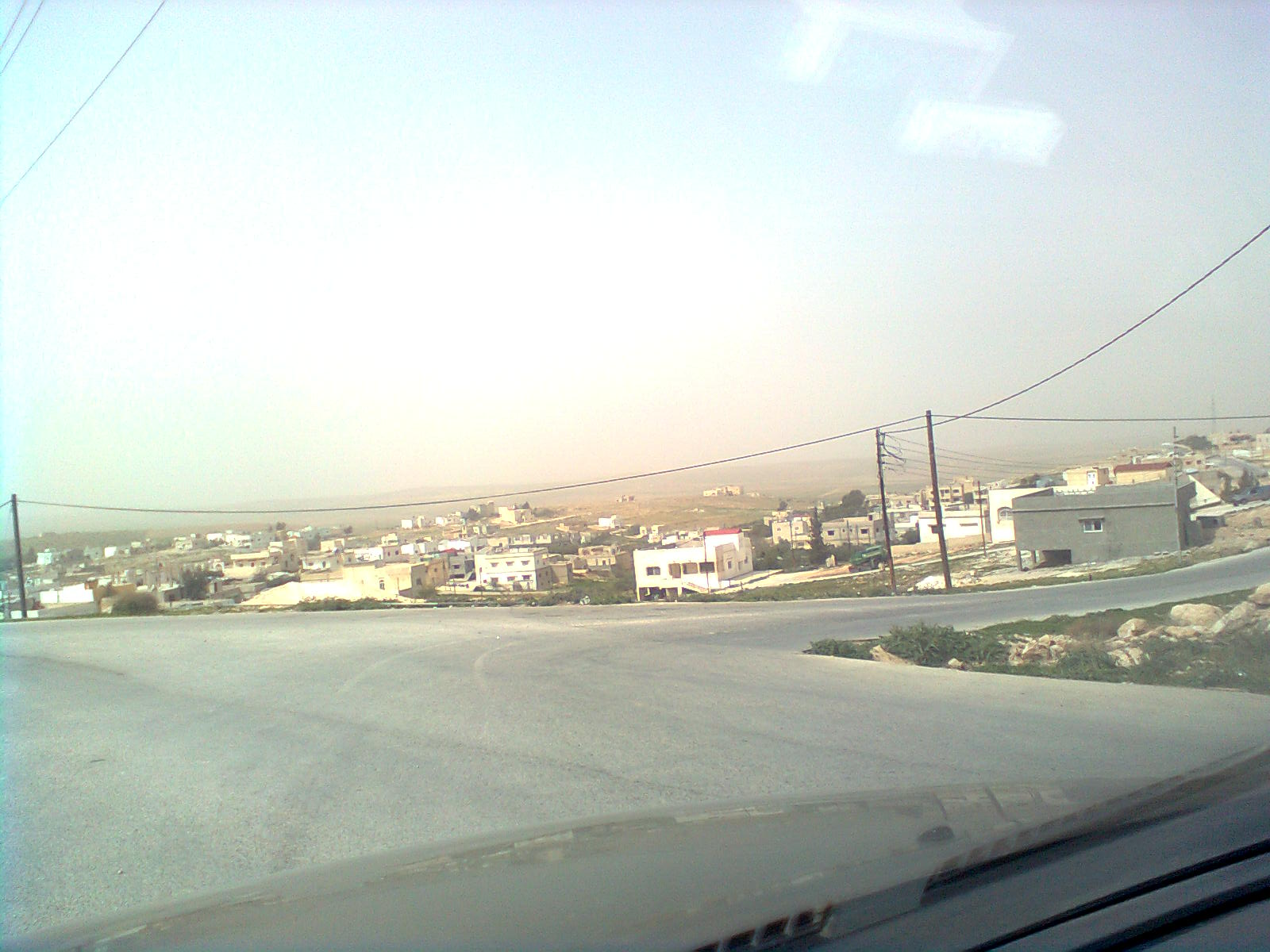 قرية ام النعام الشرقية في محافظة المفرق في الاردن